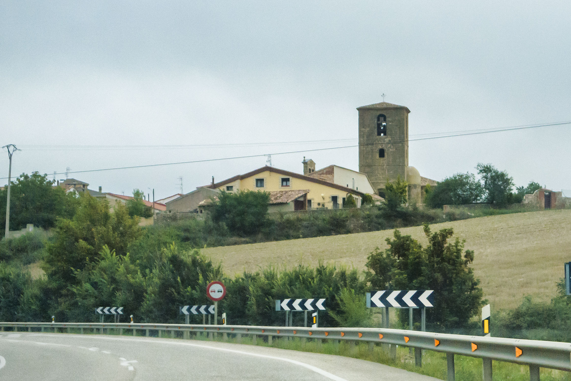 Vista de Castildelgado desde la N-120